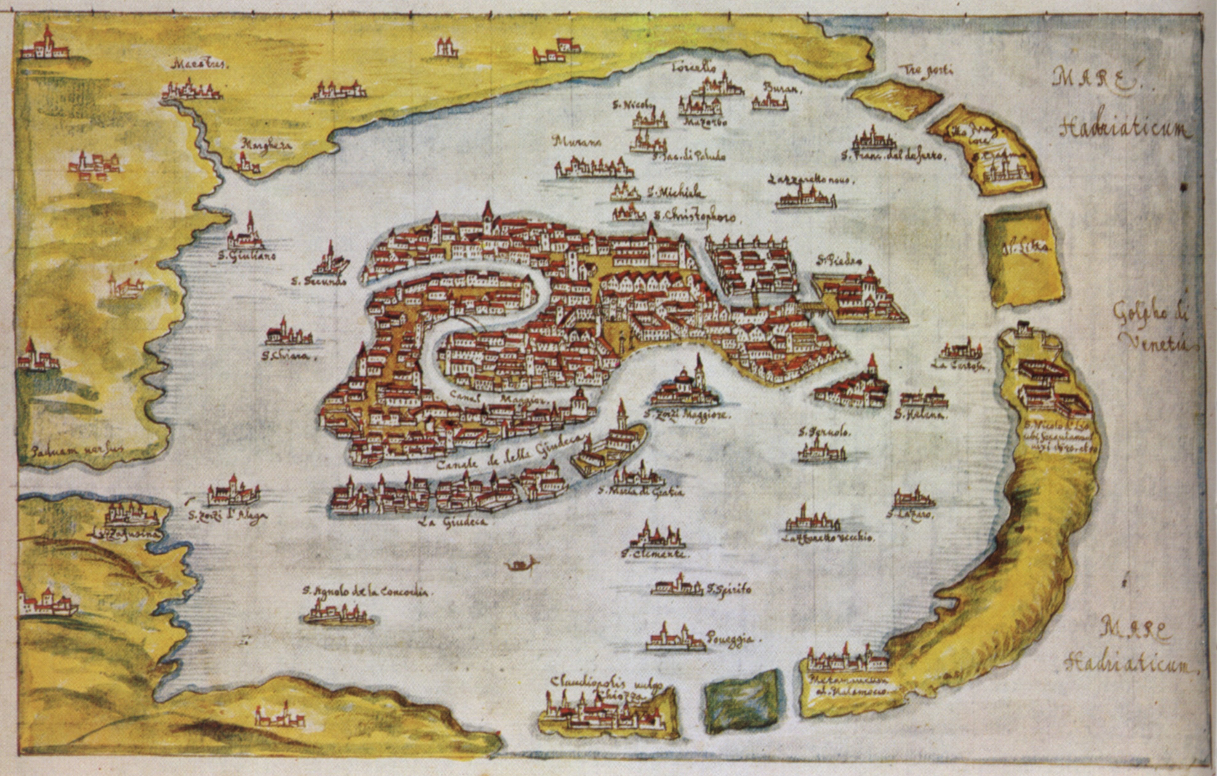 Stadt Venedig und der Lido aus der Vogelschau, 1649/1650, aus: Württembergische Landesbibliothek, HB V 15 fol 538r